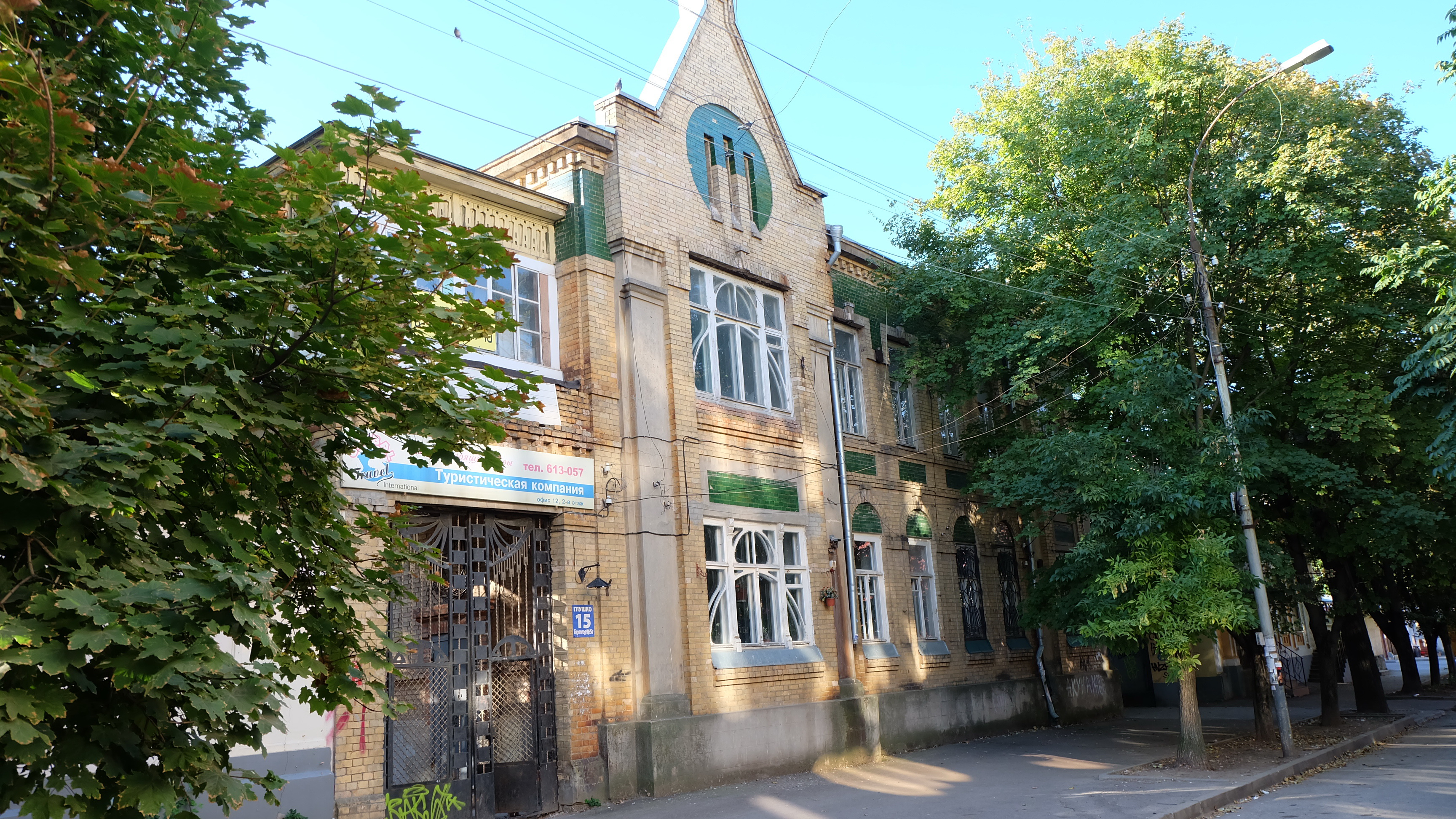 Жилой дом: переулок А. Глушко, 15, Таганрог, Ростовская область